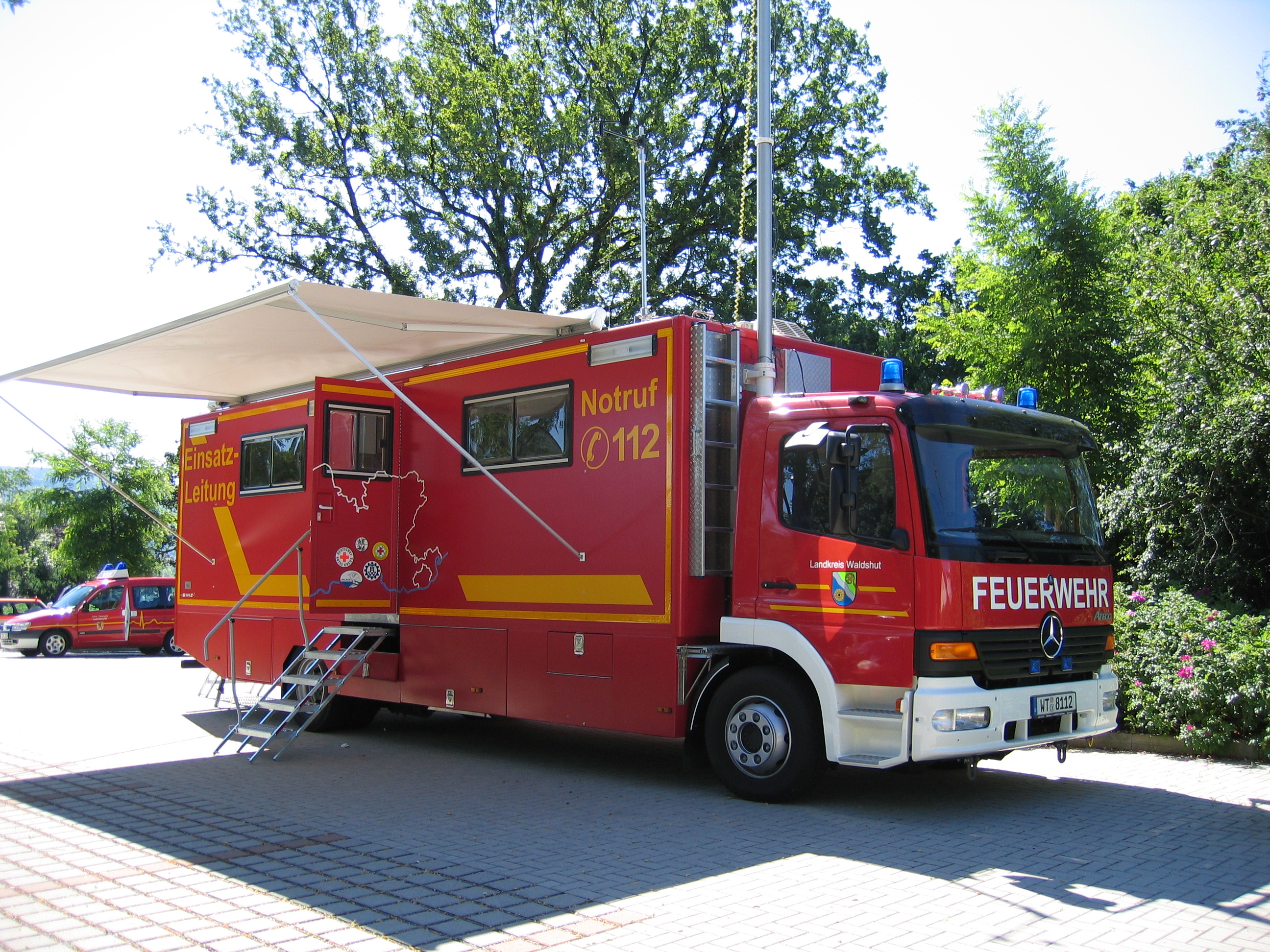 ELW2 des Landkreises Waldshut